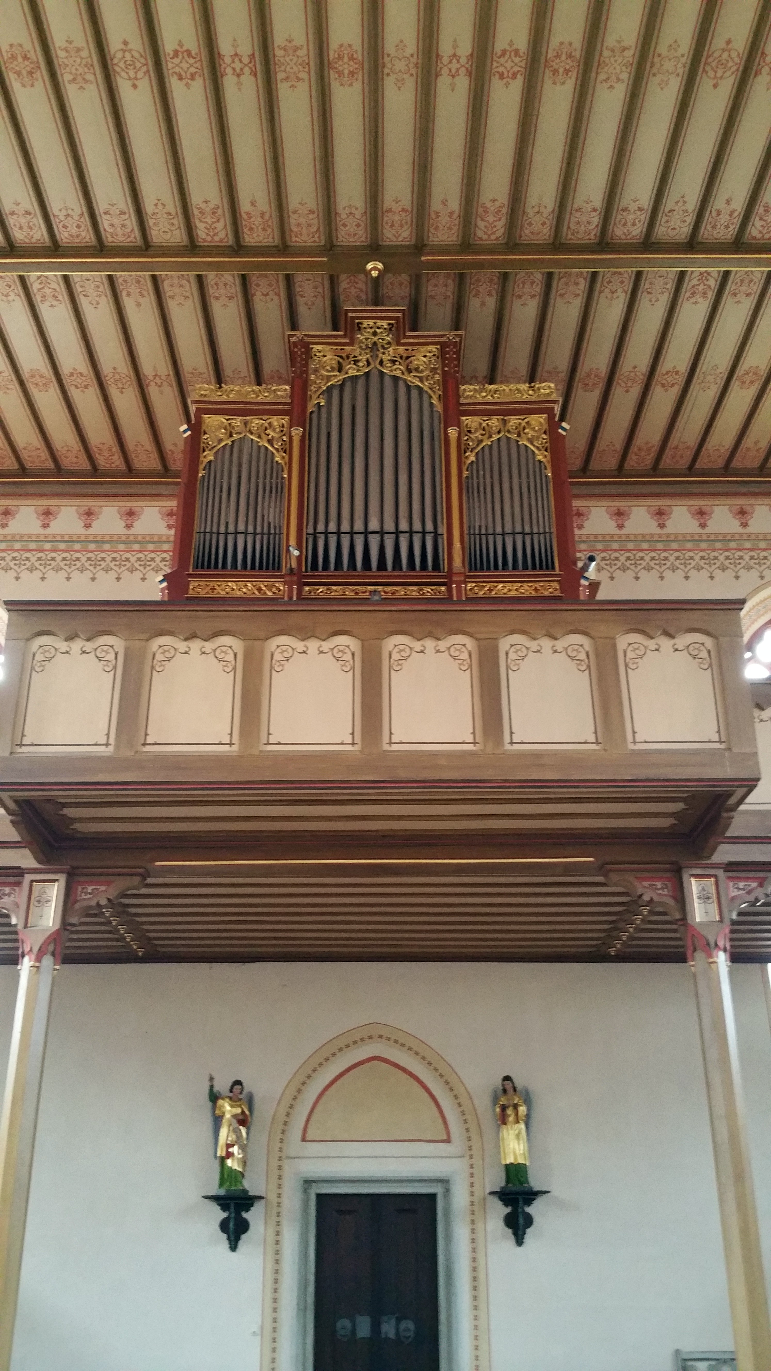 Orgel von St. Nikolaus (Bergkirche), Bad Abbach. Erbaut um 1853 von Johann Anton Breil